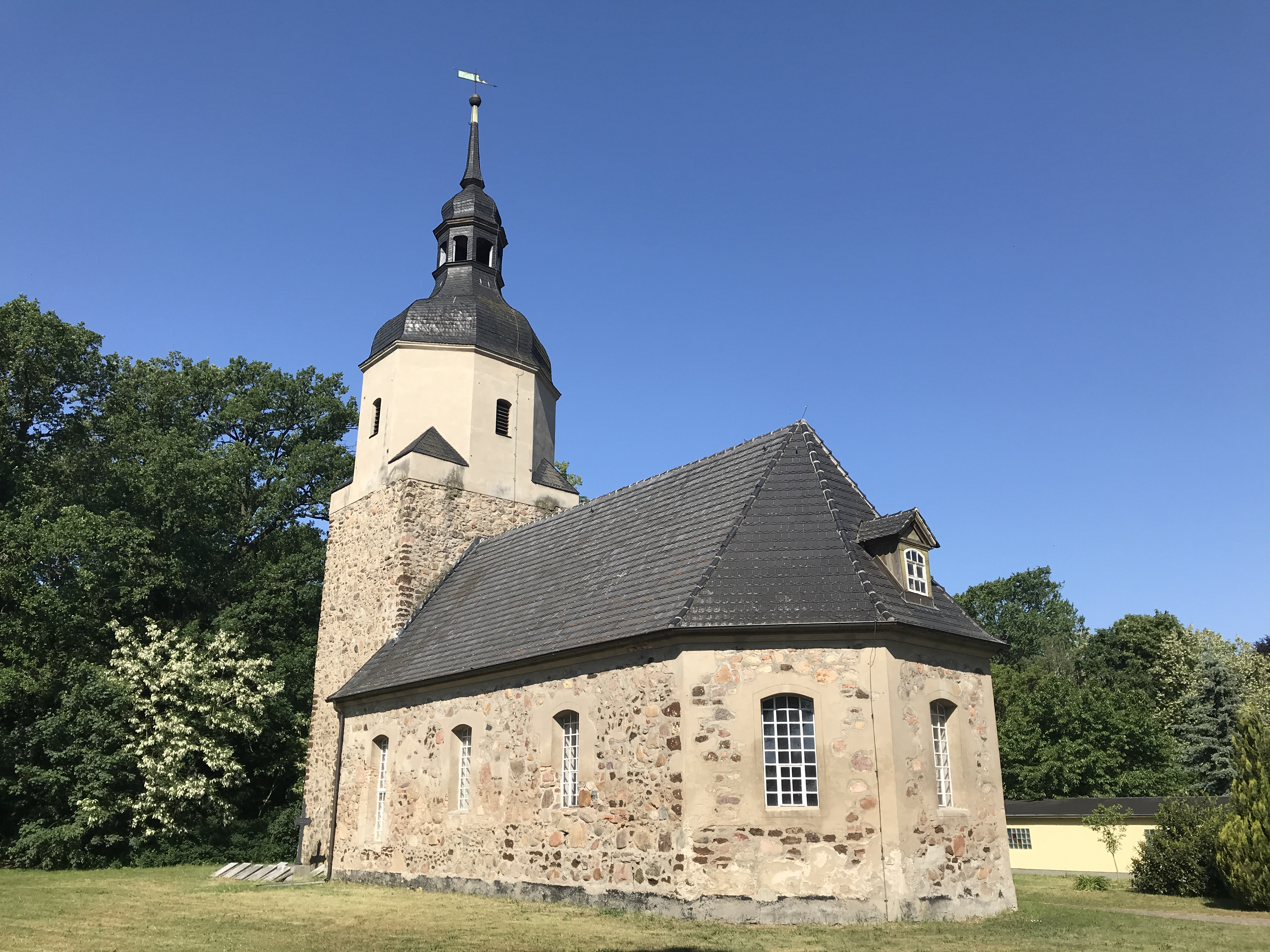 Die Dorfkirche in Krossen entstand im 15. Jahrhundert und wurde um 1745 umfangreich erweitert. Im Innern des Bauwerks steht unter anderem ein Kanzelaltar aus dieser Zeit.